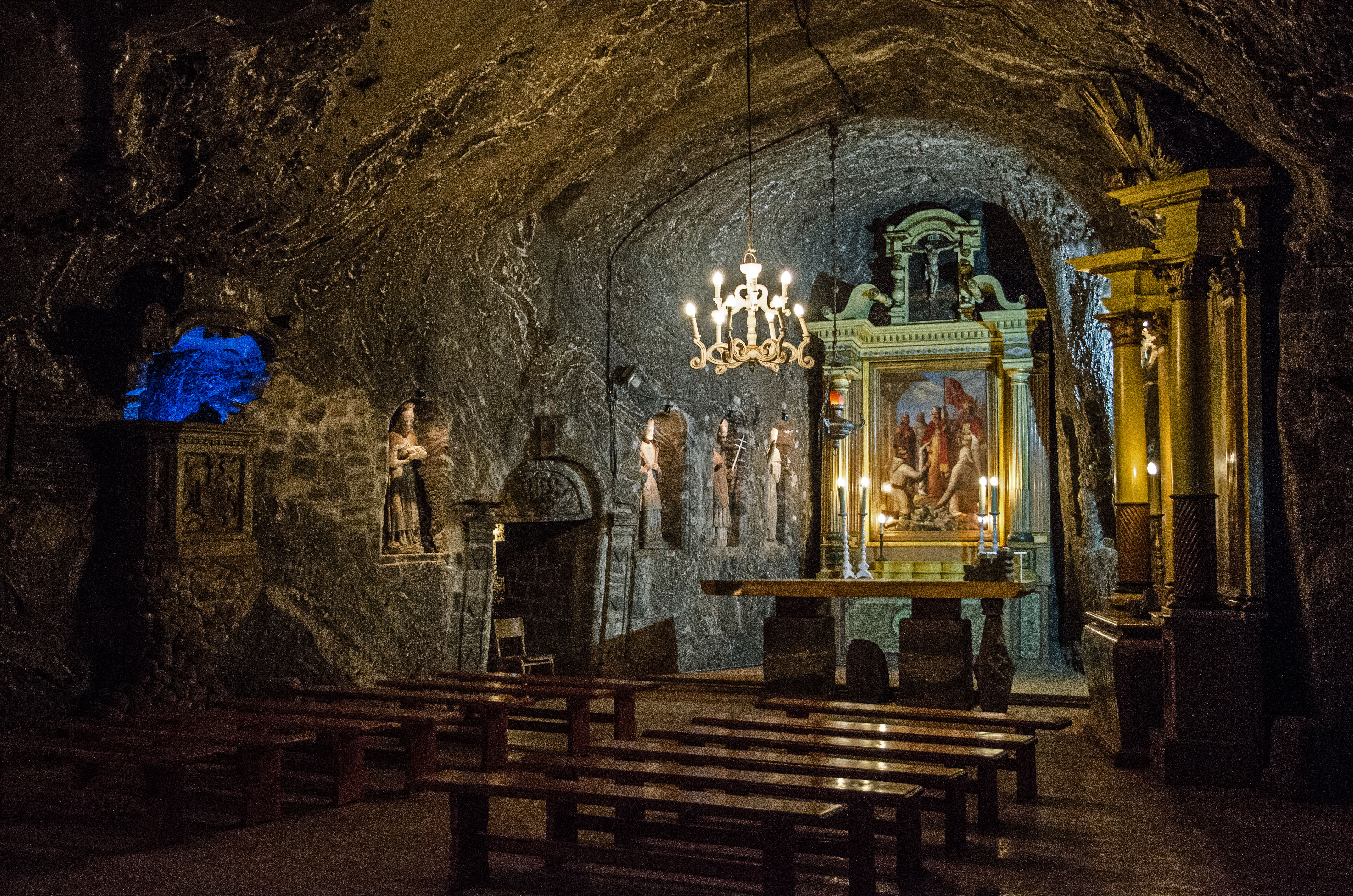 Bochnia, kopalnia soli (najstarsza część)